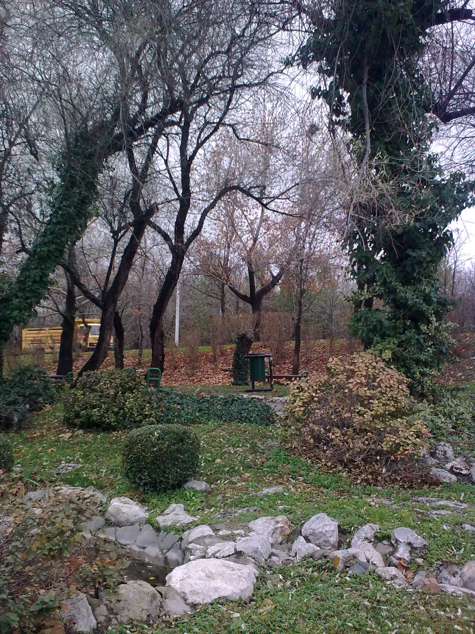 ODTÜ KKM bahçesi.